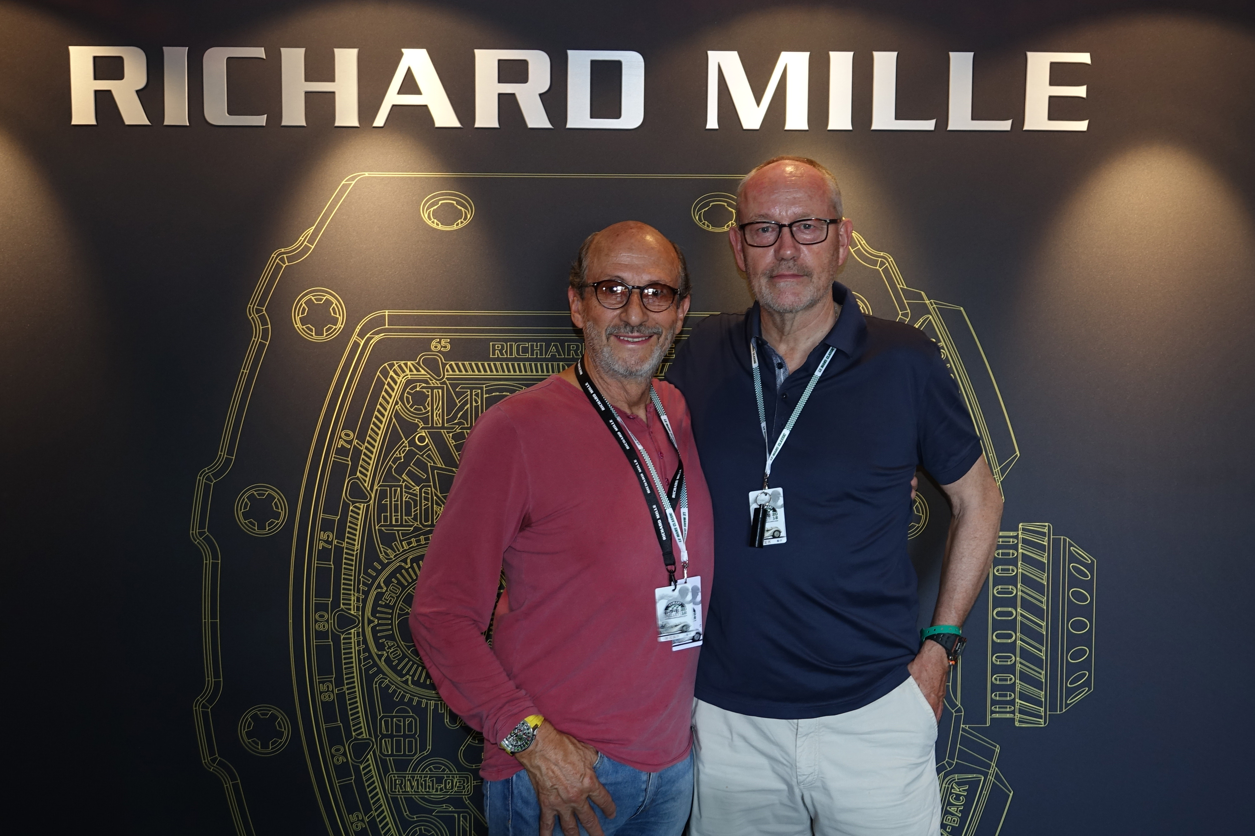 Richard Mille et Dominique Guenat au Le Mans Classic 20018